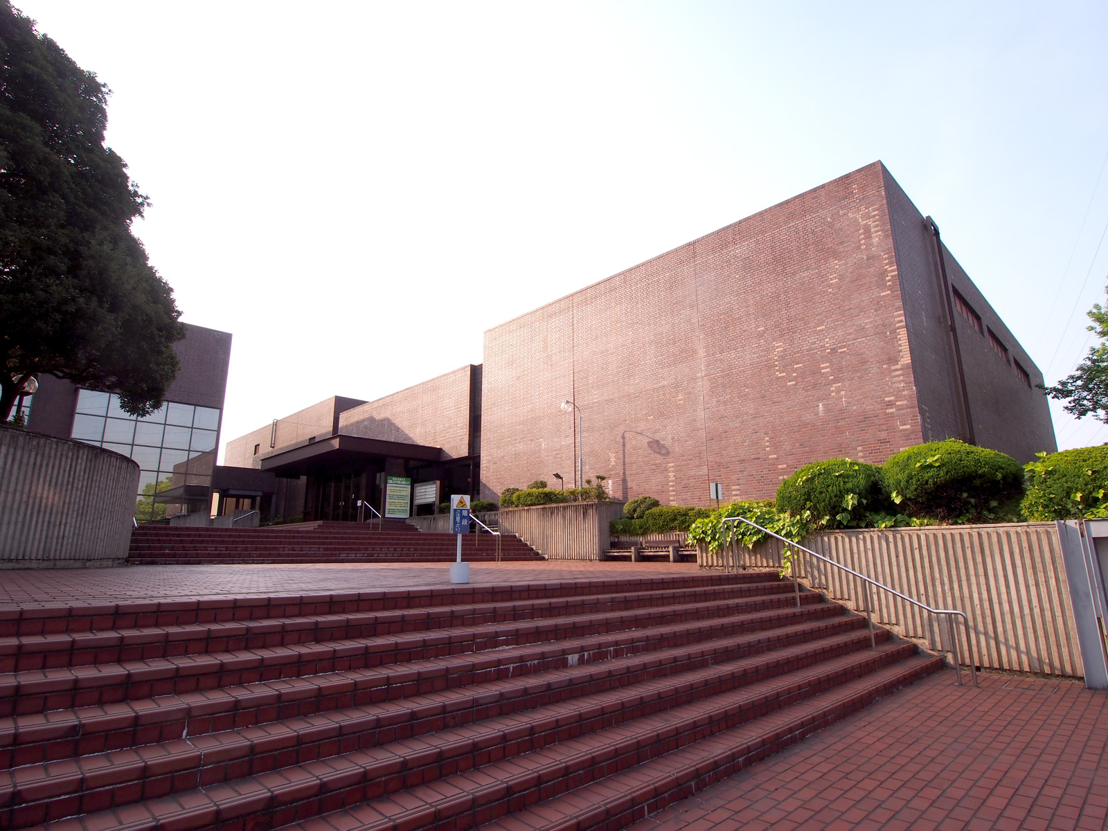 大分県立芸術会館（大分県大分市）